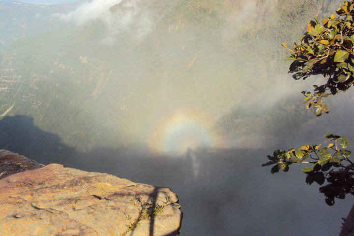 Fenómeno natural conocido como "antelia", que se forma en el lugar conocido como "Salto blanco", Betulia, Santander.